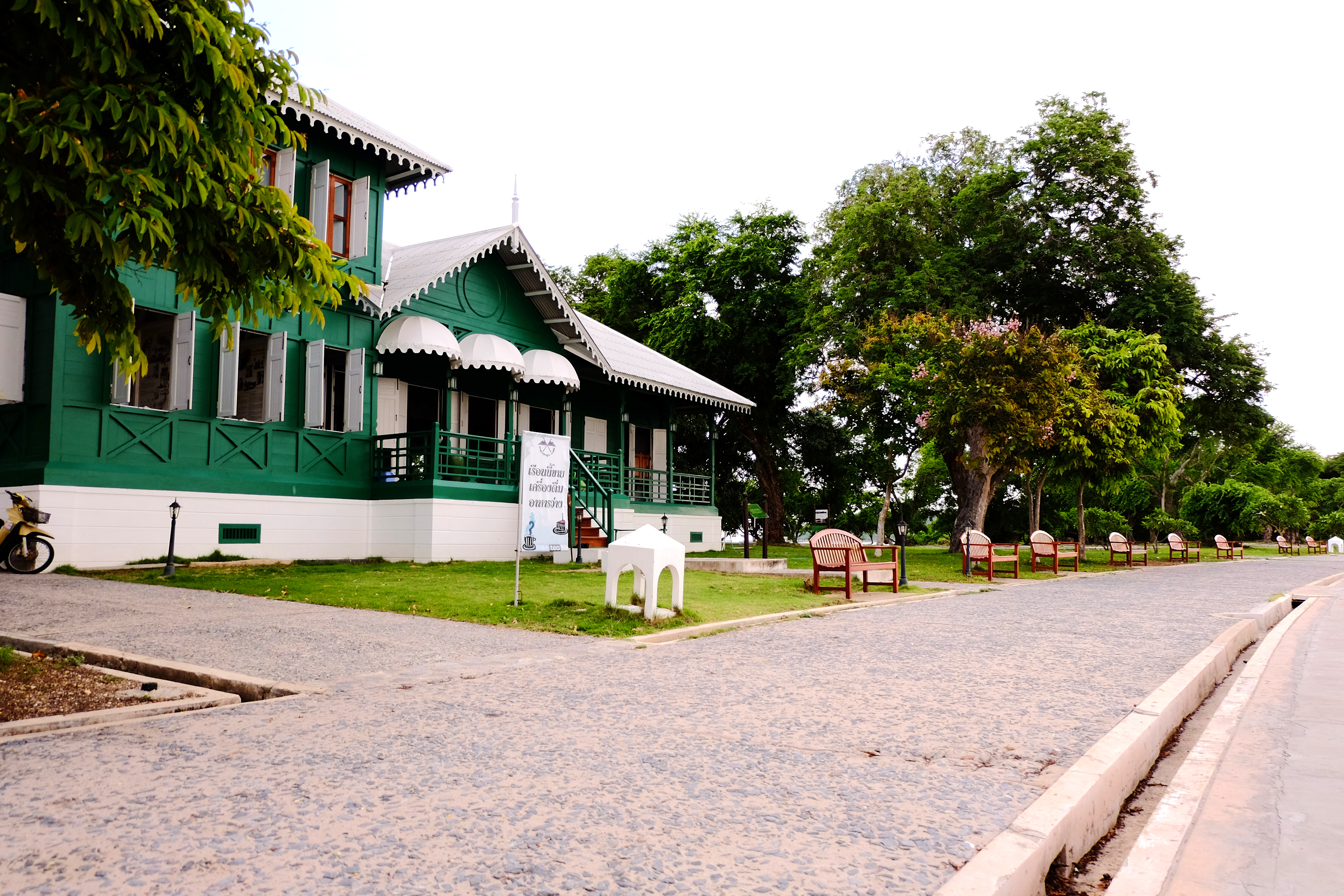 พระจุฑาธุชราชฐาน